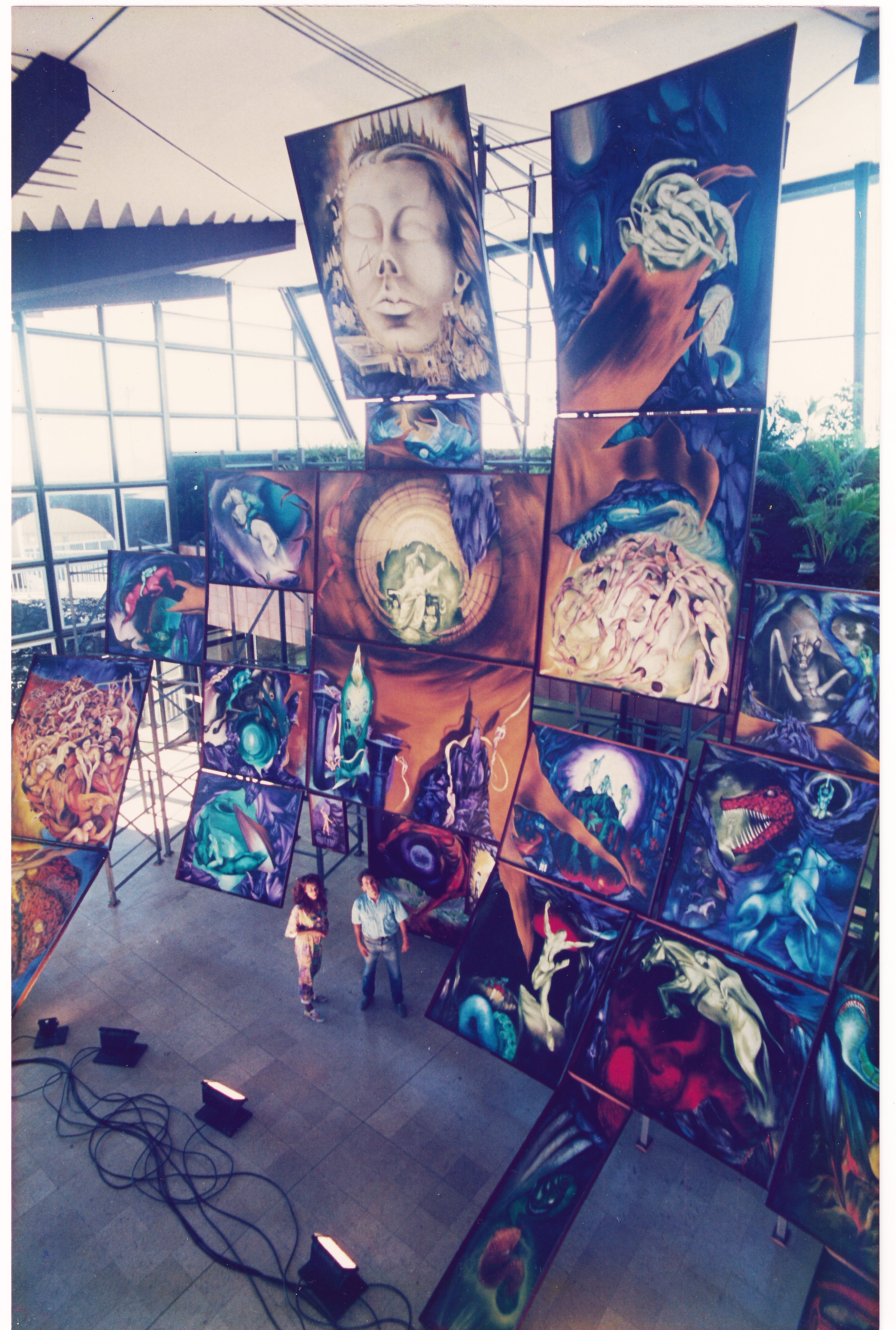 Apocalypse ou "Illusions Non-EUclidiennes" par Gilbert Kieffer. Oeuvre-installation à grande dimension (9 metres de haut x 12 metres de large x 6 metres de profondeur) composée de 21 peintures à l'huile dépeignant l'Apocalypse selon Saint-Jean.